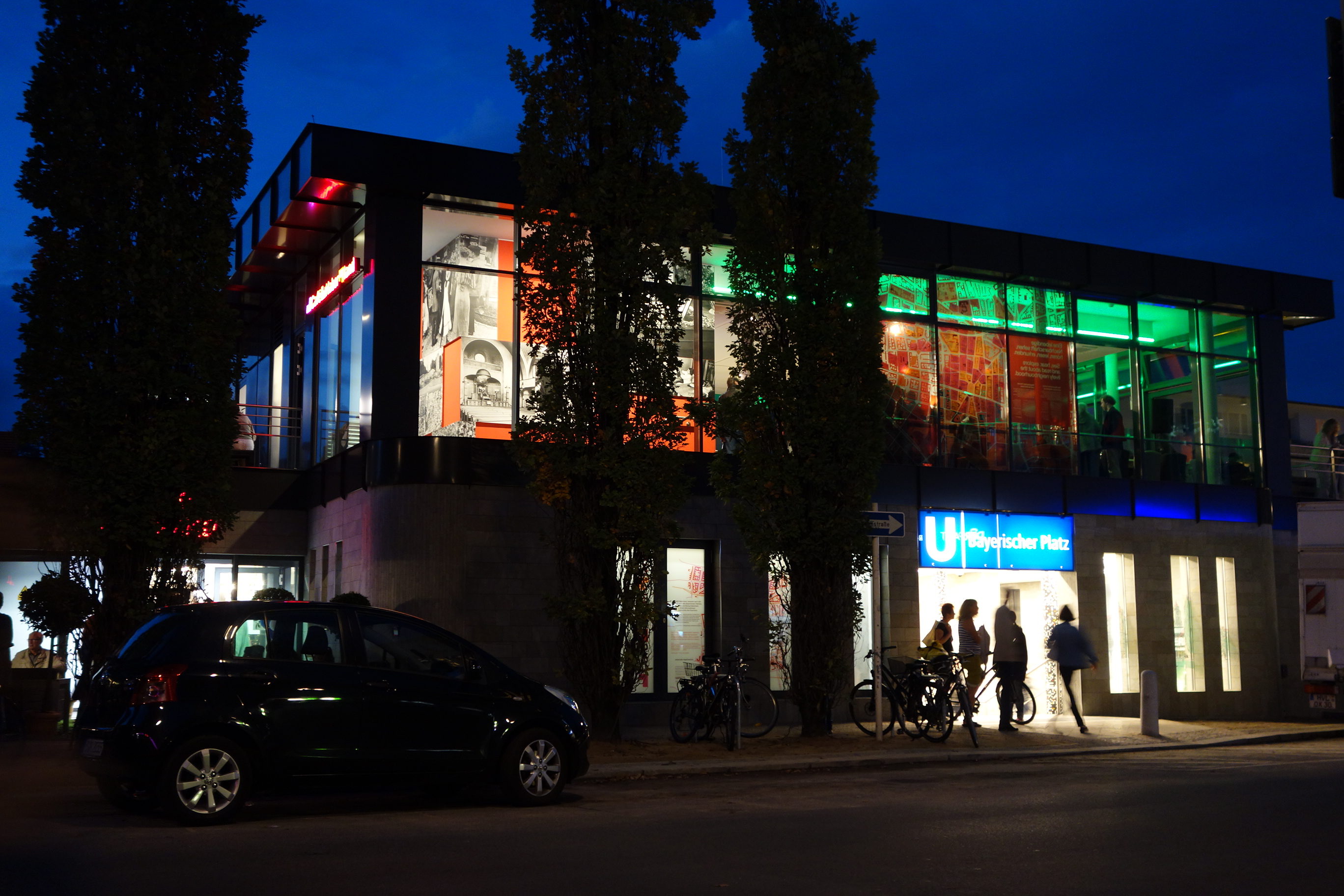 U-Bahnhof Bayerischer Platz in Berlin, Neubau des Südzugangs bei Nacht, oben das Café Haberland, aufgenommen am Abend der offiziellen Eröffnung